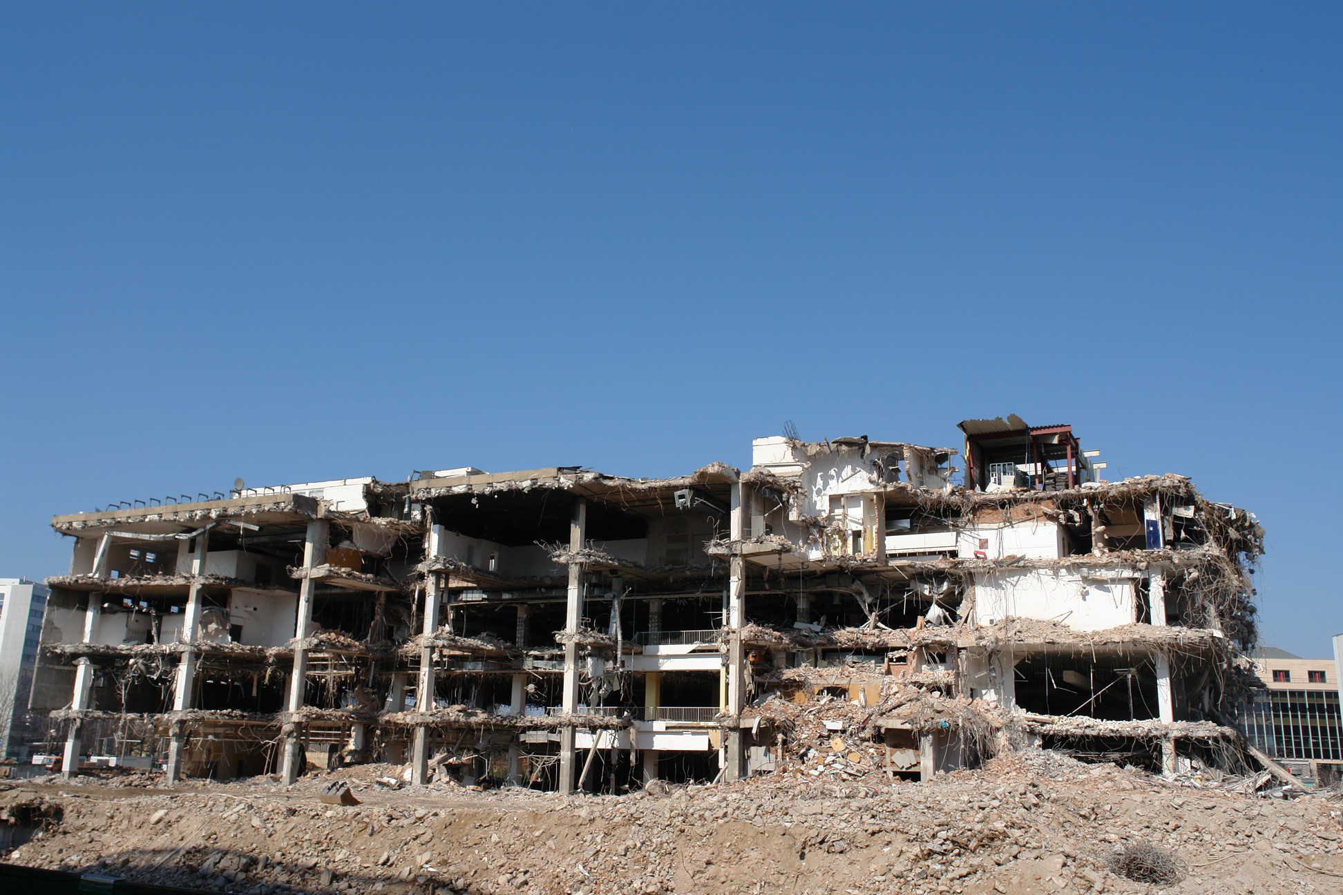 Centrum Warenhaus während des Abrisses